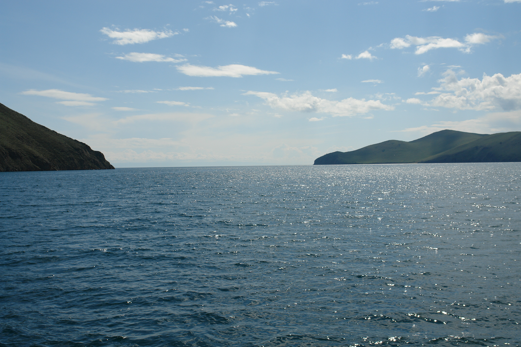 Пролив "Ольхонские Ворота"